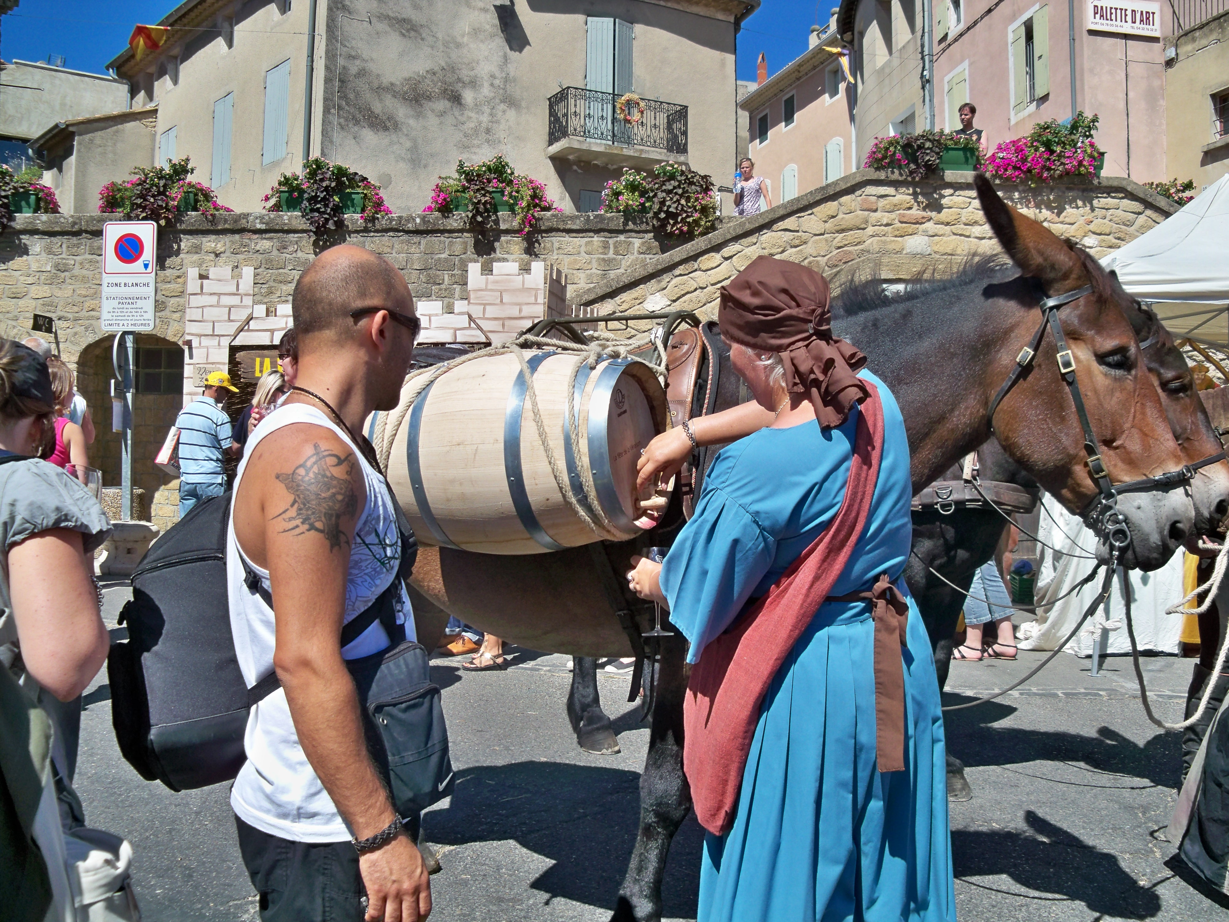 Fêtes de la Véraison, Chateauneuf du Pape, Vaucluse, France